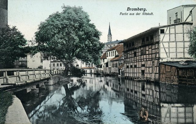 Wenecja Bydgoska - pocztówka z pocz. XX w.